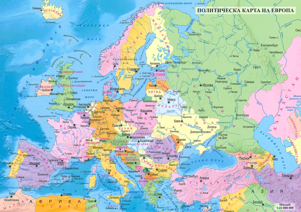 Политическа карта на Европа